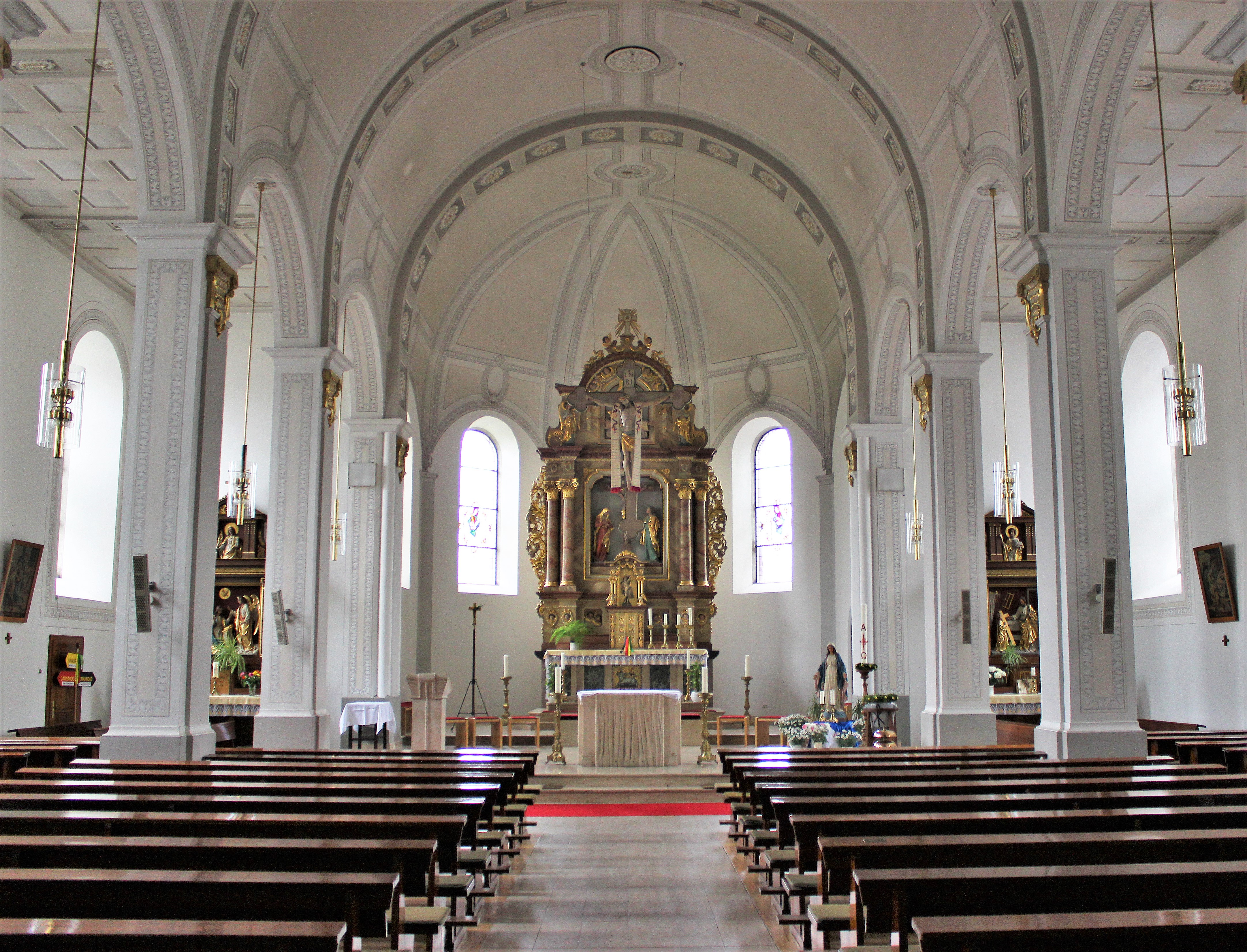 Blick ins Innere der katholischen Pfarrkirche St. Sebastian in Eppelborn, Landkreis Neunkirchen, Saarland